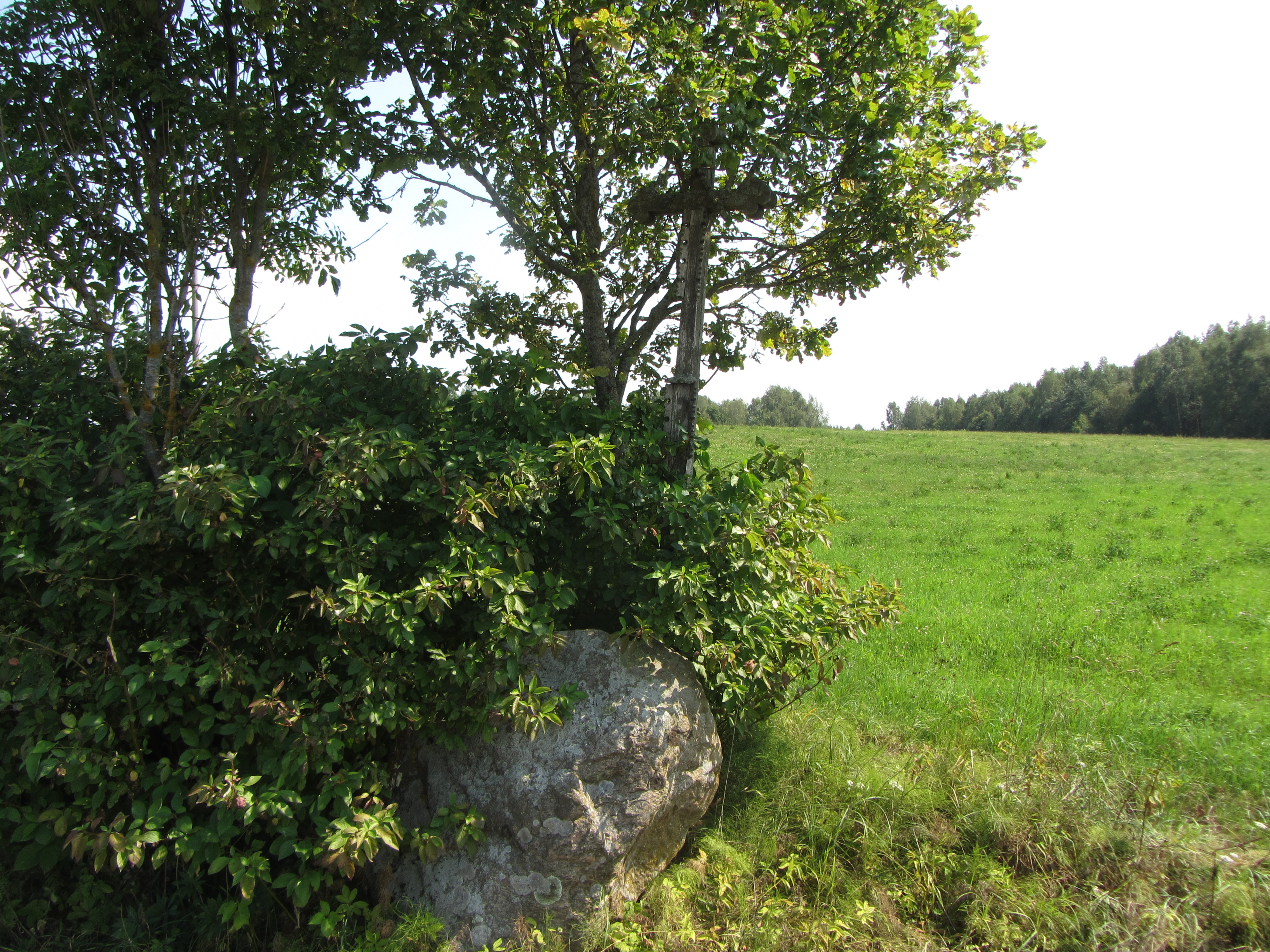 Dubingių sen., Lithuania